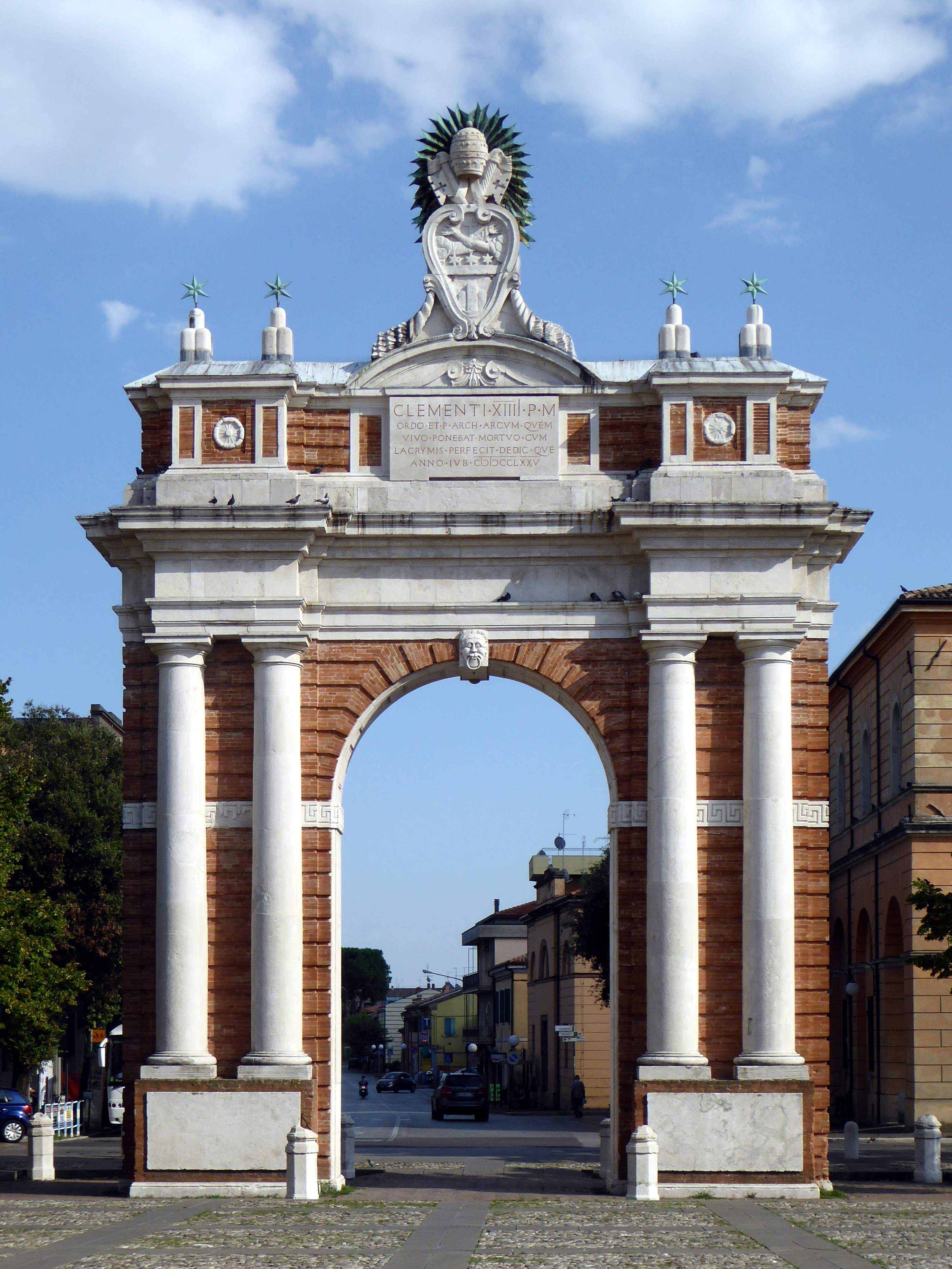 Santarcangelo di Romagna, der Ganganelli-Bogen (oder Klemensbogen; 18. Jhdt.) an der Piazza Ganganelli.